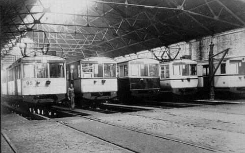 Coches La Brugeoise en Polvorín con sus tres esquemas de colores.